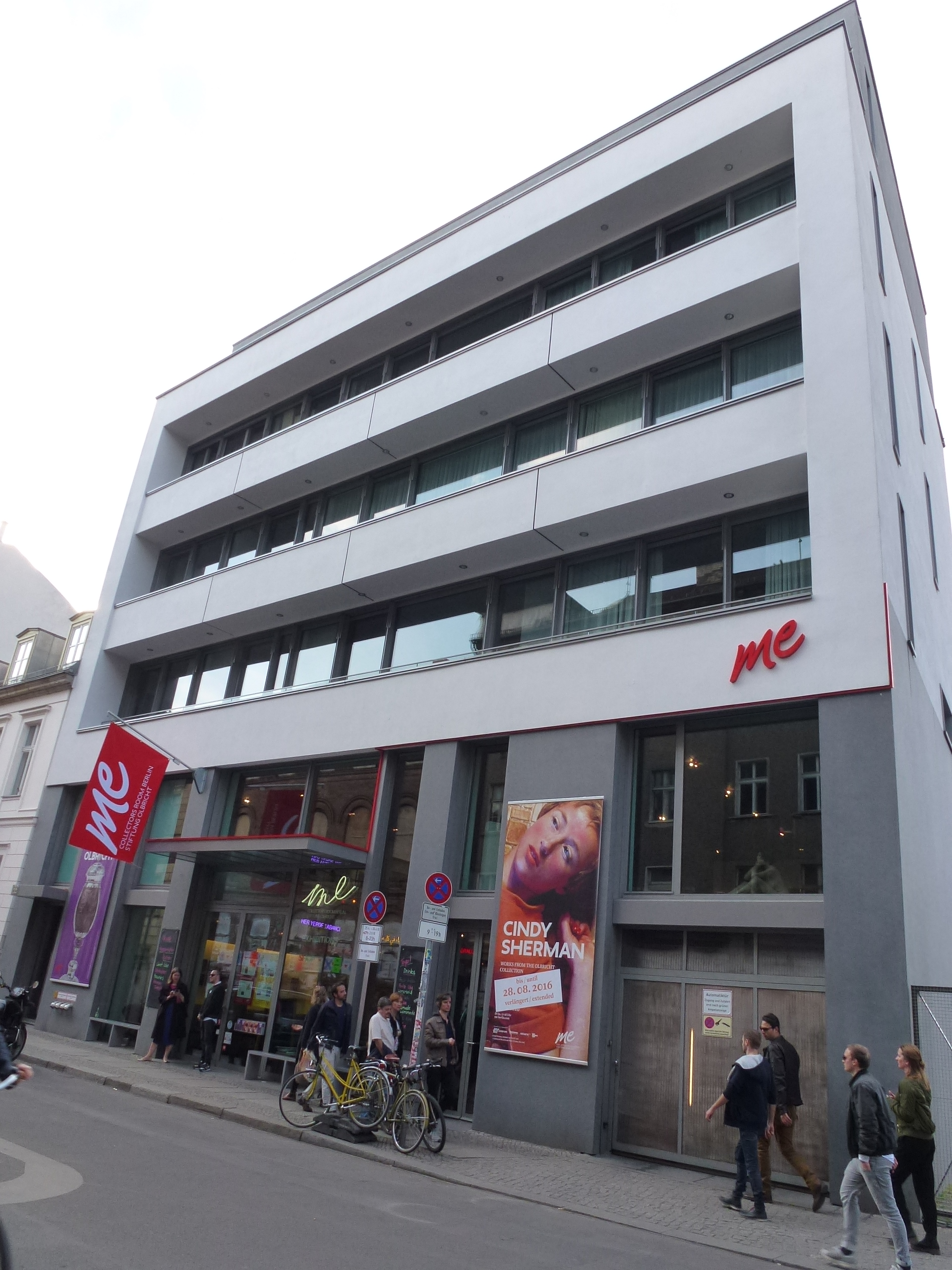 Berlin-Mitte Auguststraße am Gallery Weekend